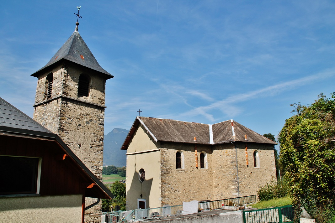 église St Pierre